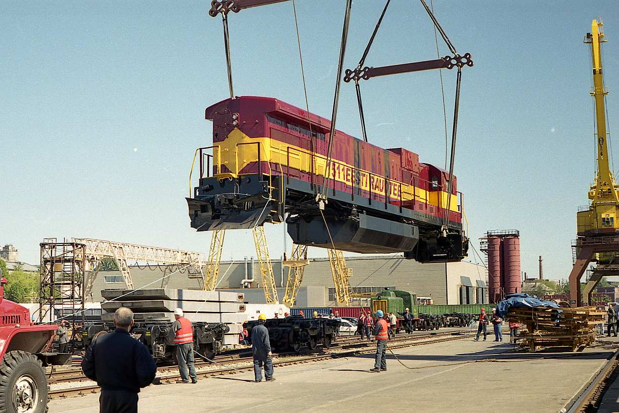 Заводской номер:45058 Строительный:970511R MP 9018 (C36-7) UP 1 9018 (03.1989) UP 2 2618 (02.1996) UP 3 618 (06.1997) Был приписан до 06.2001